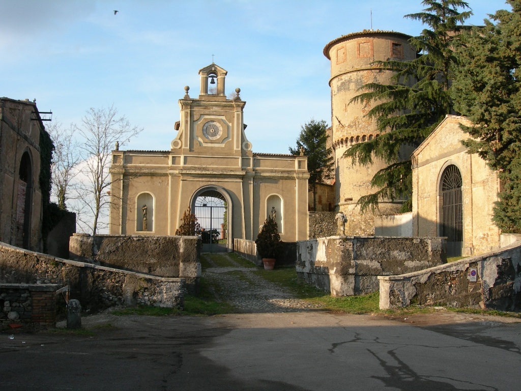 Castel Viscardo, Terni, Italy - castle